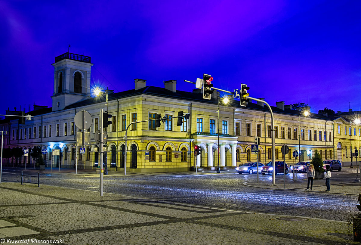 Ratusz Miejski w Suwałkach